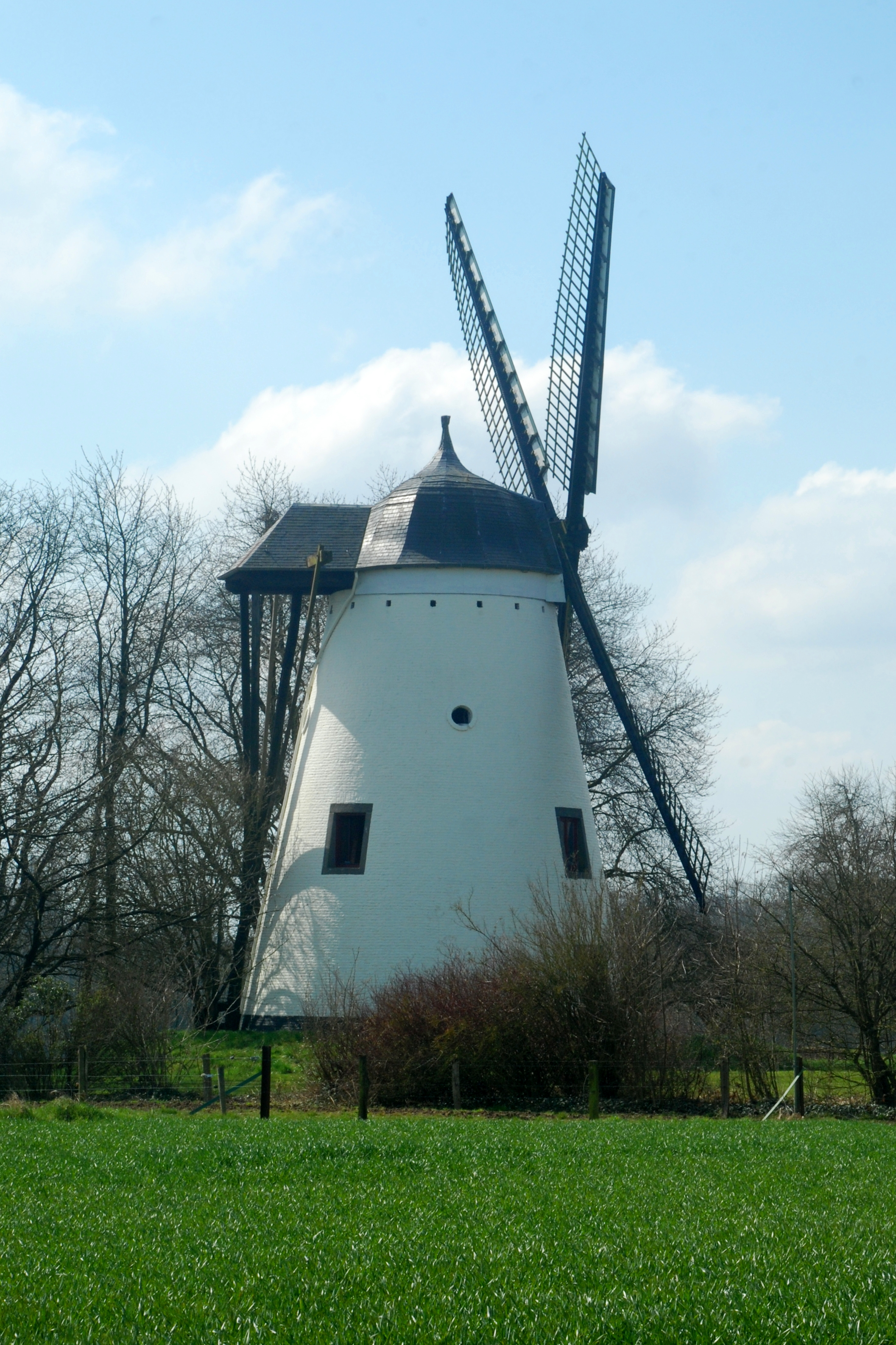 Belgique - Walhain - Moulin du Tiège